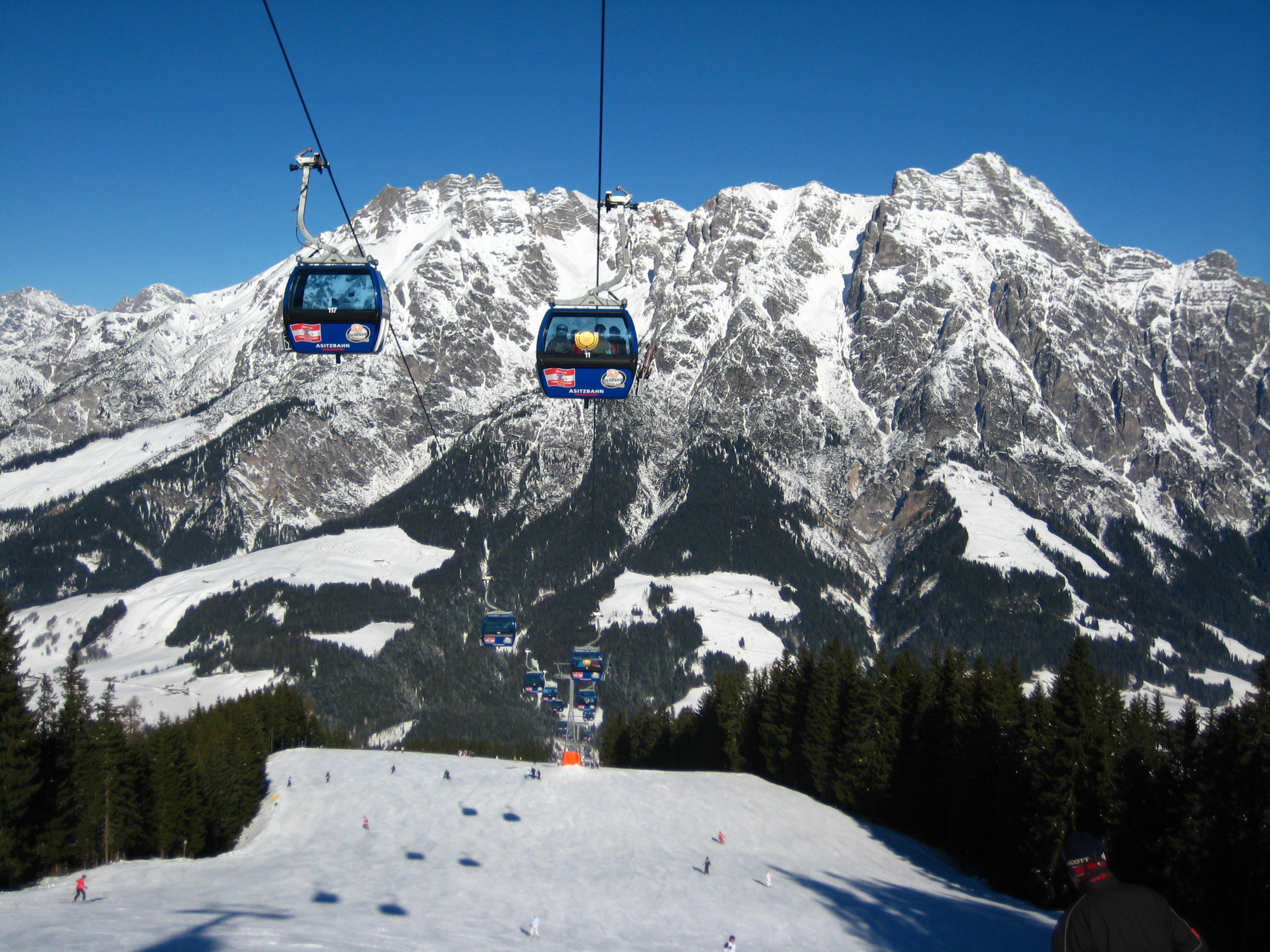 Die Leoganger Steinberge vom Asitz aus, im Tal dazwischen befindet sich die Ortschaft Leogang.